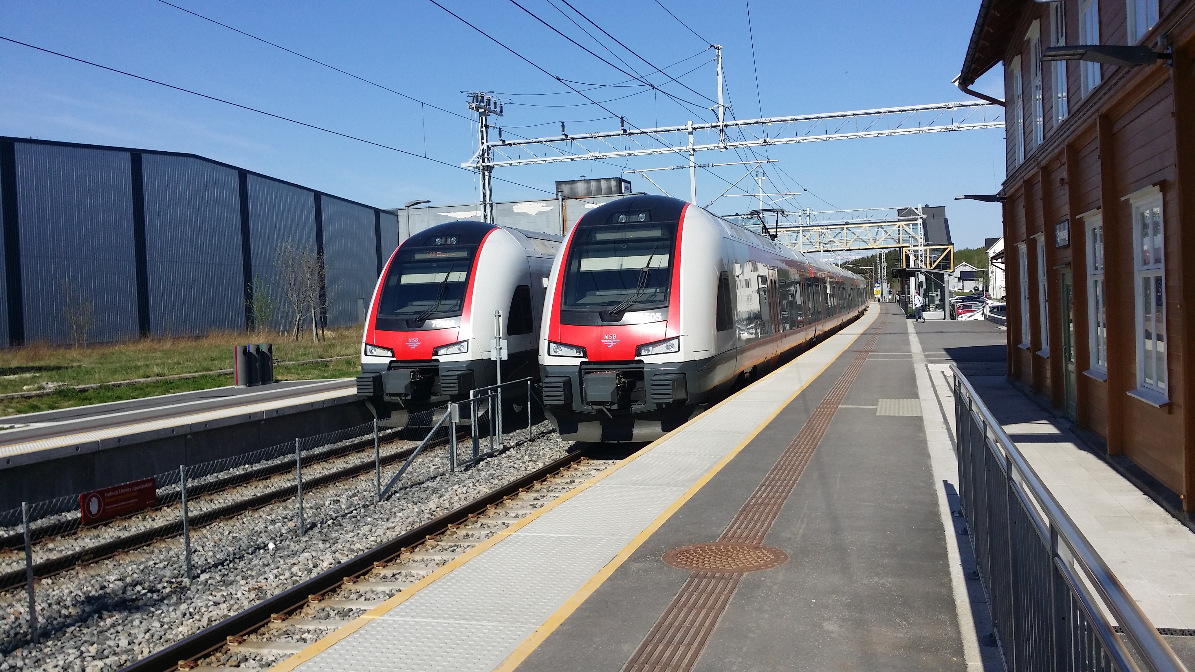 To lokaltog møtes på den sterkt moderniserte Spydeberg stasjon.